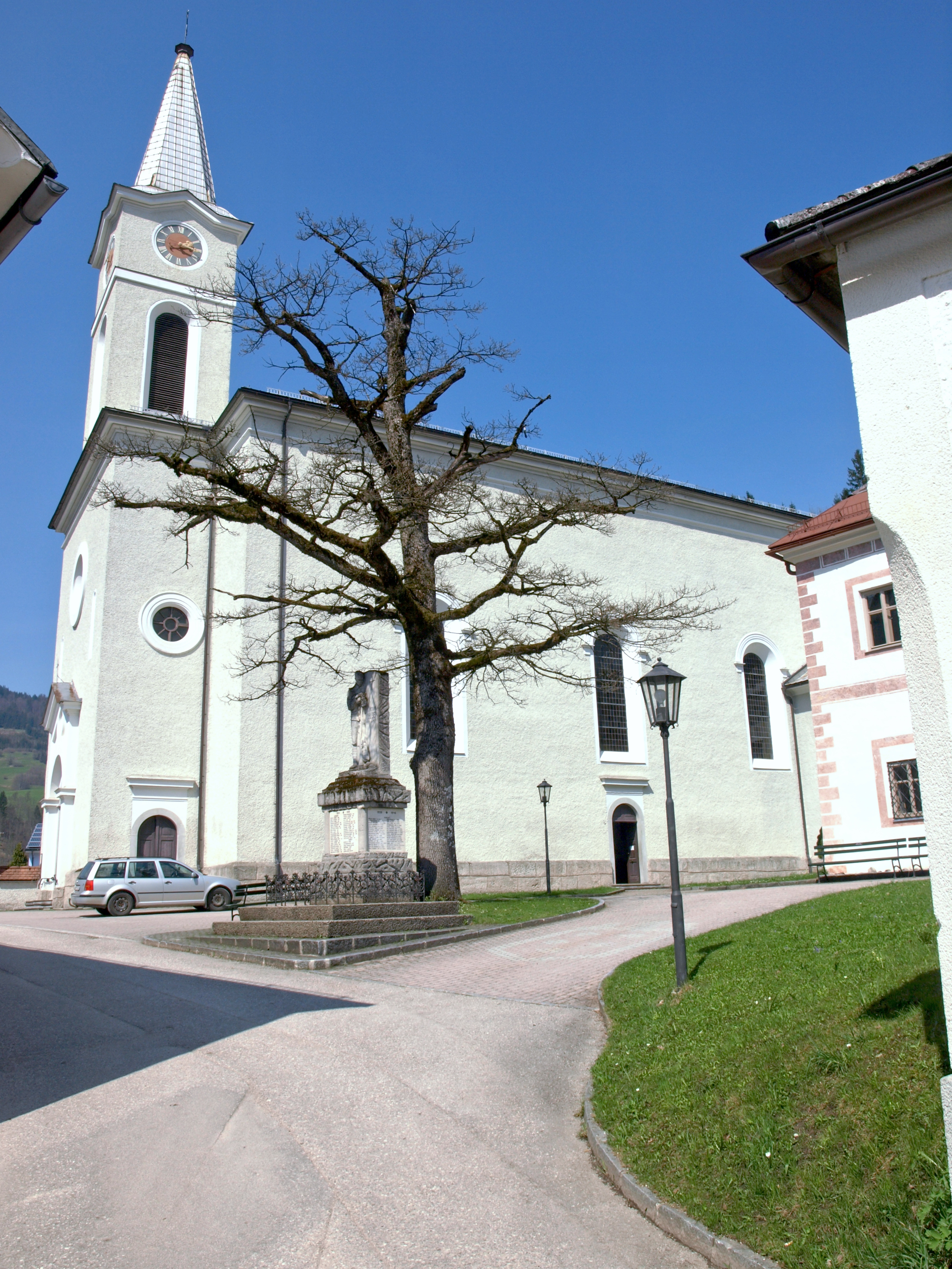 Kath. Pfarrkirche hl. Kunigunde